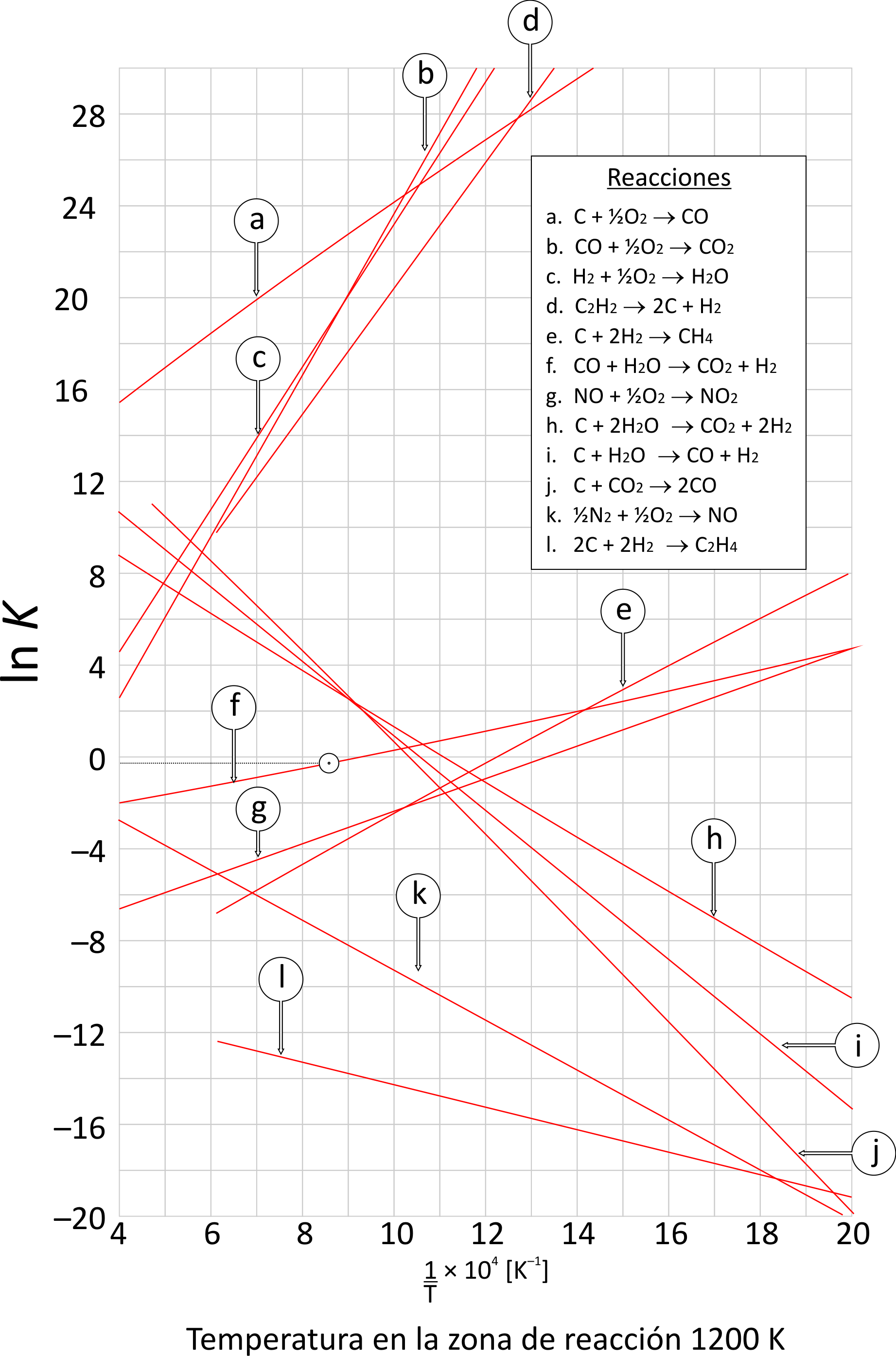 Variación de las constantes de disociación a diferentes temperaturas